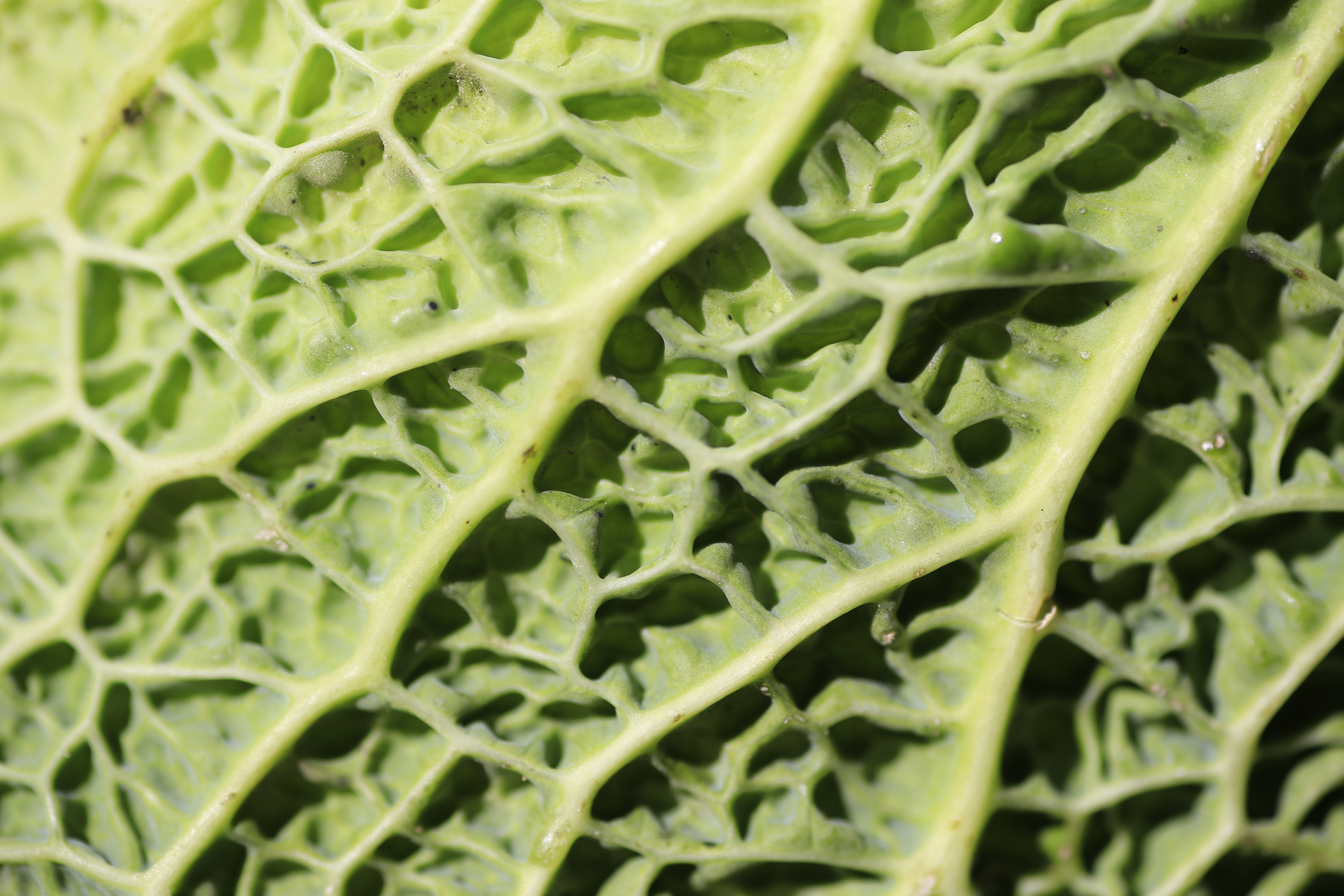 foglia di cavolo verza - retro